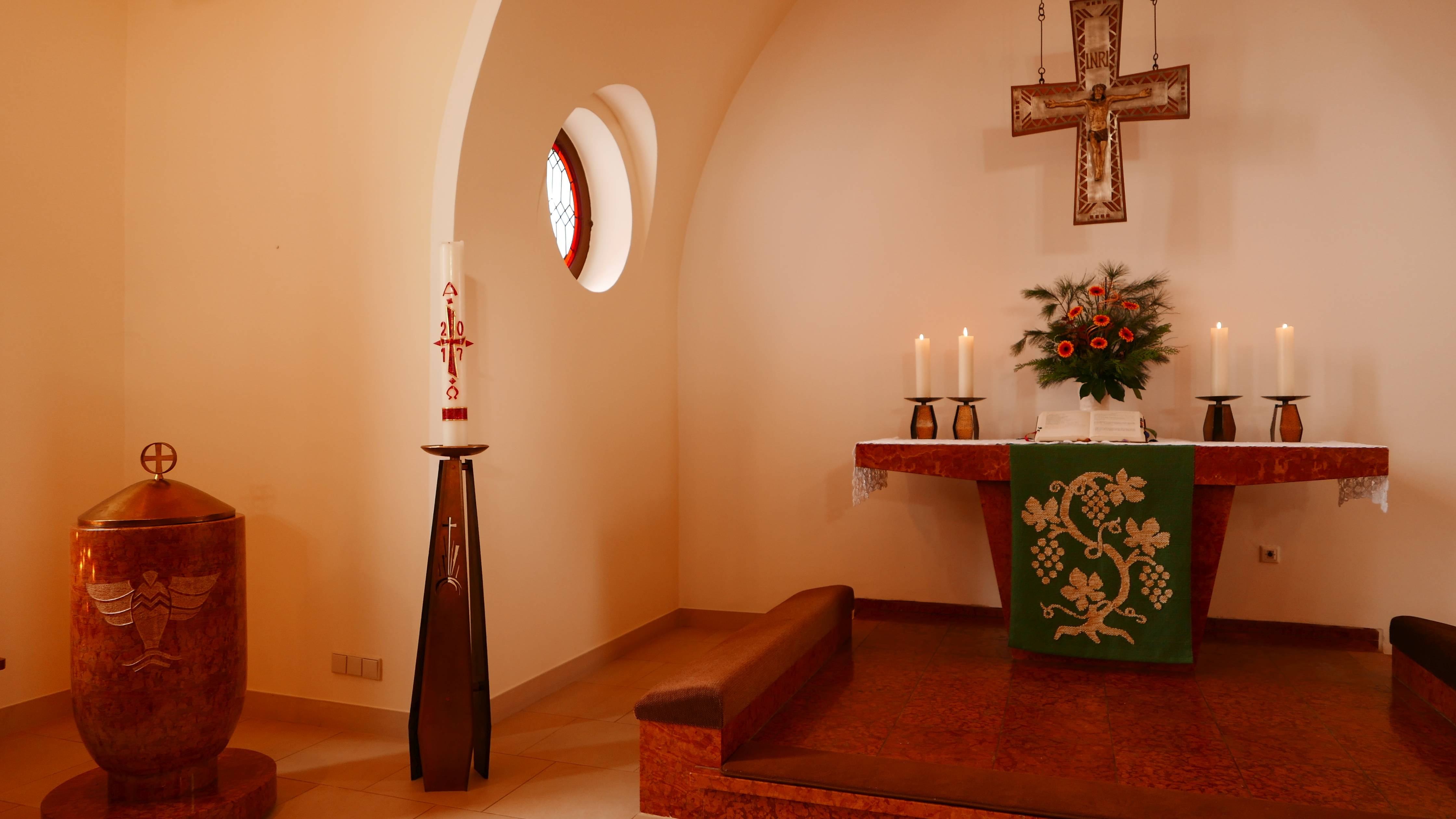 Zionskirche in Allendorf/Lumda, Landkreis Gießen, Hessen, Deutschland